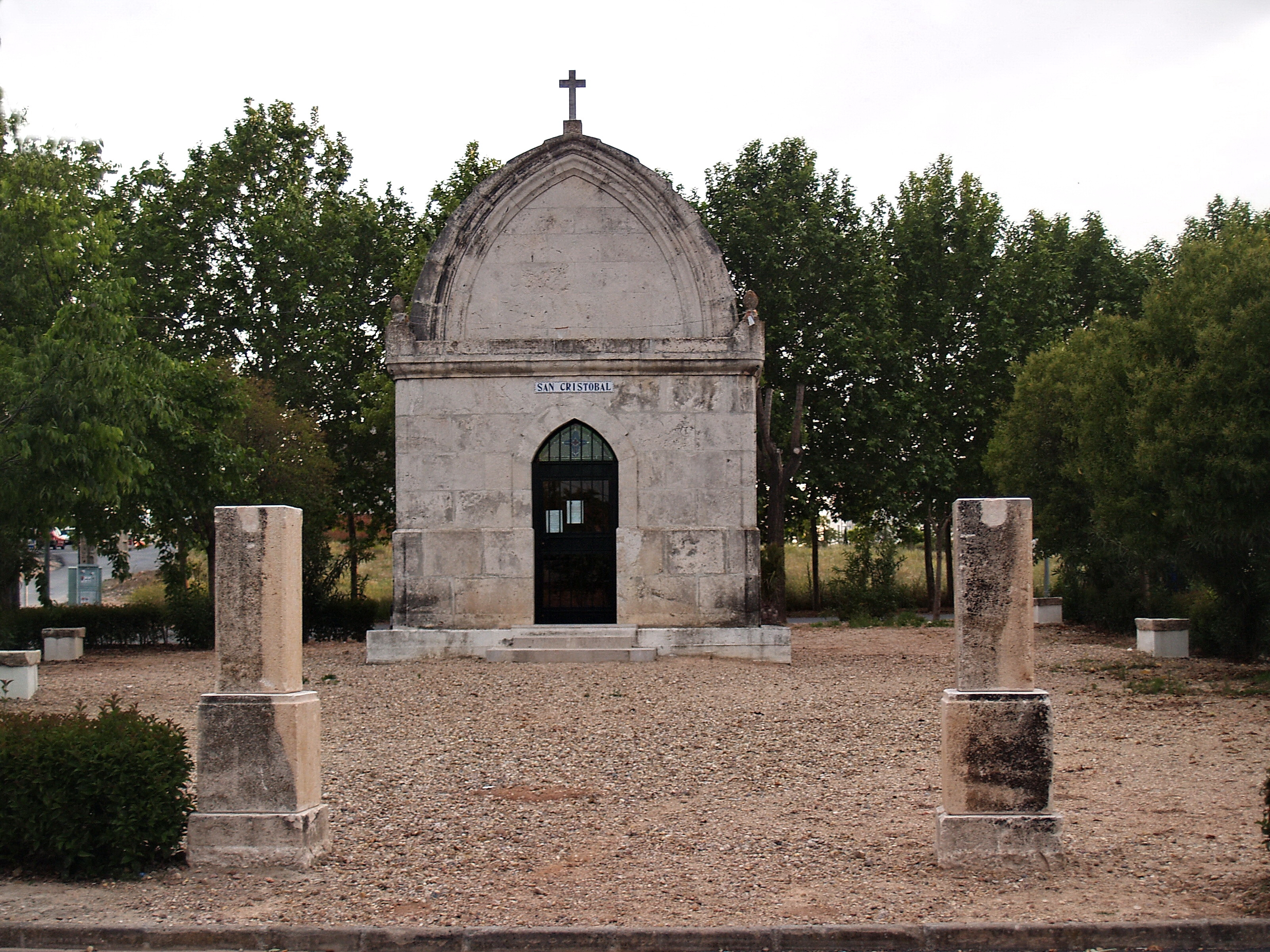 Capilla de San Cristóbal en Noblejas